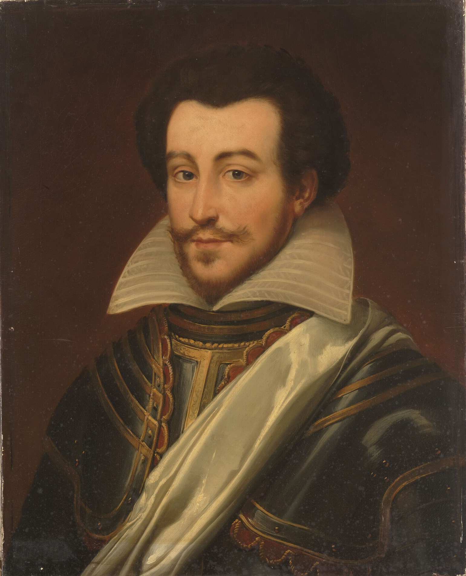 copie d'après un original conservé au château de Beauregard ; commandé par Louis-Philippe pour le musée historique de Versailles en 1835